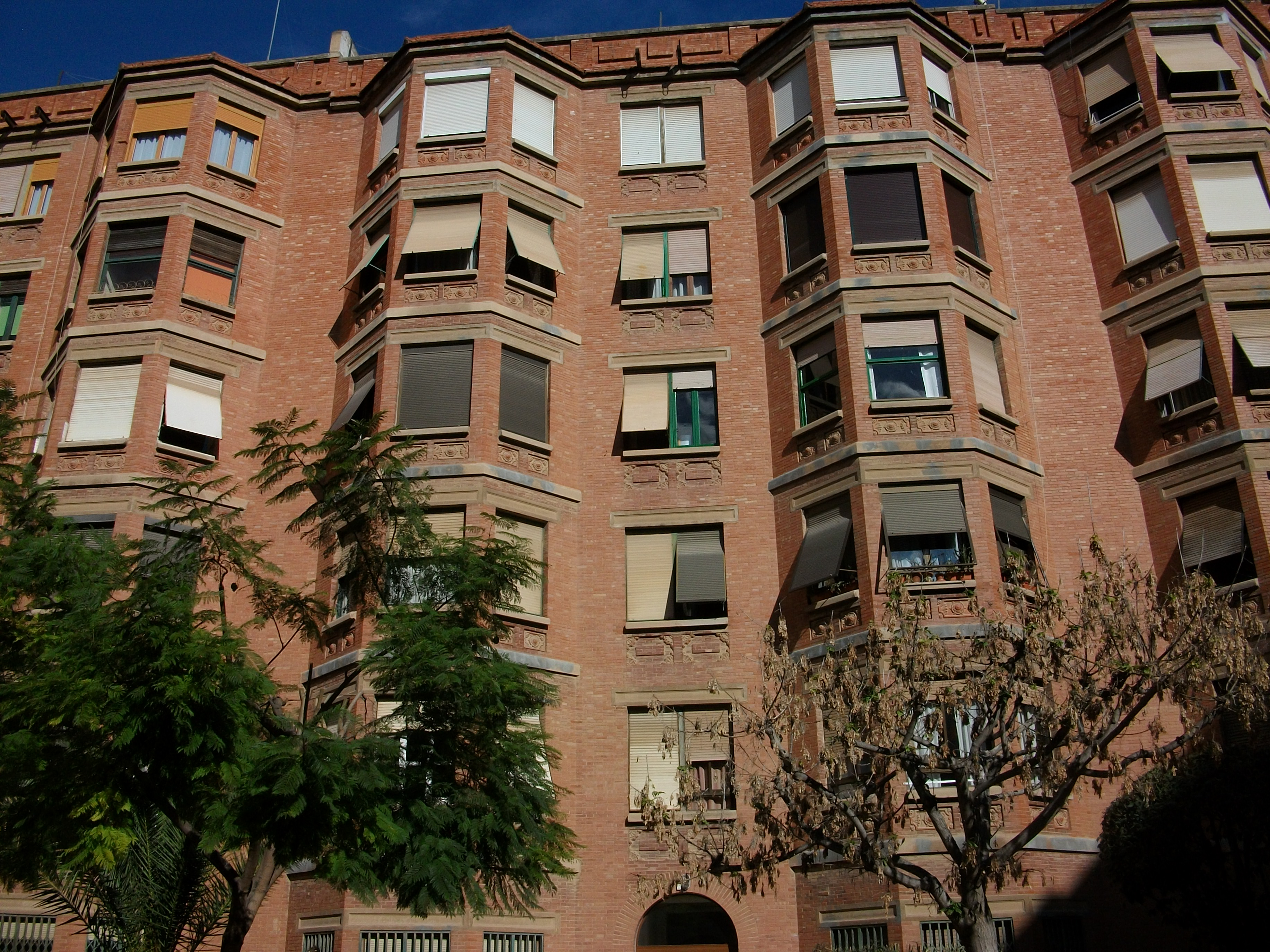 Finca Roja de València.